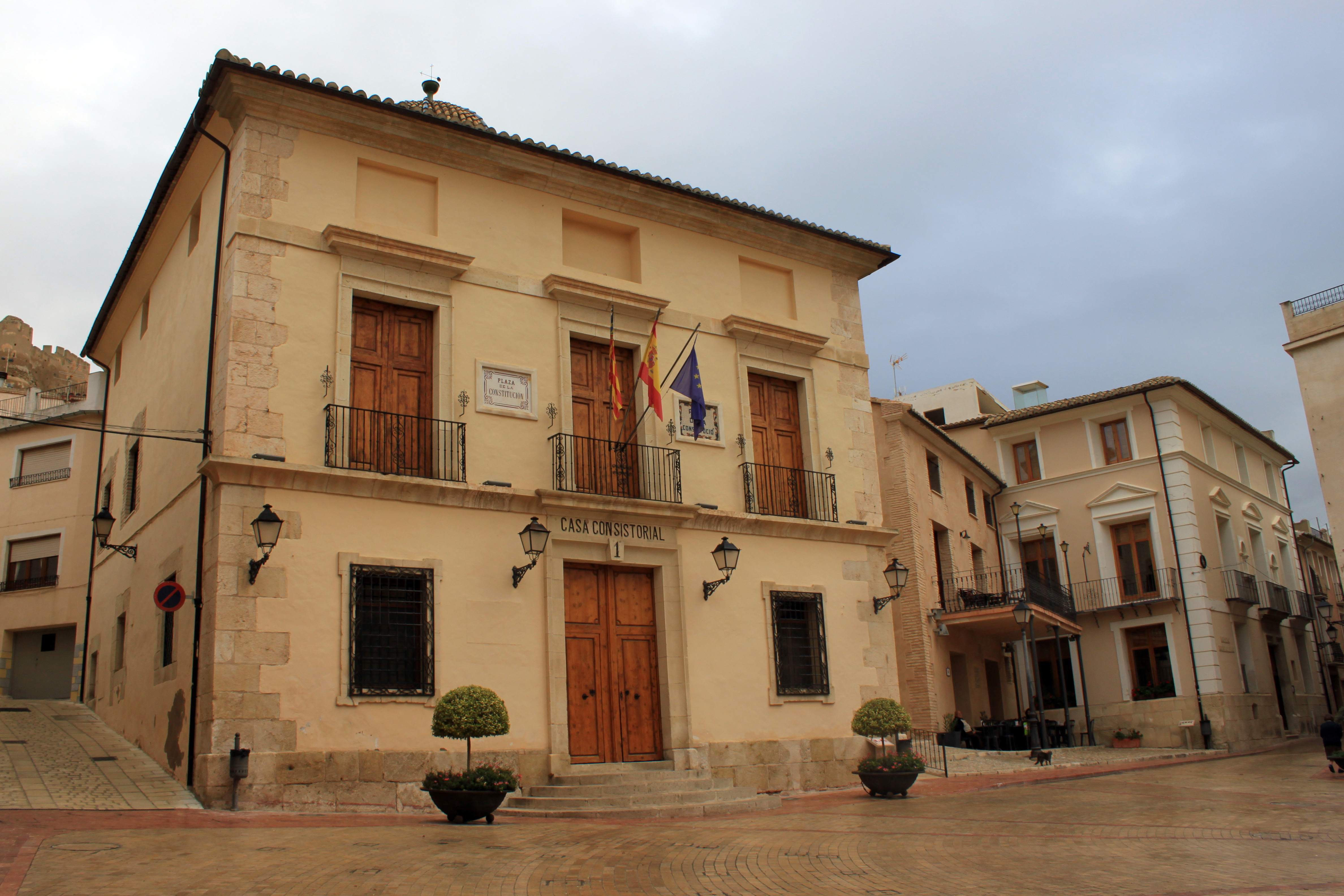 Vista del edificio del ayuntamiento de la localidad de Biar, provincia de Alicante, Comunidad Valenciana, España.